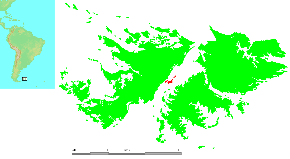 Falkland Islands - Swan Islands.PNG